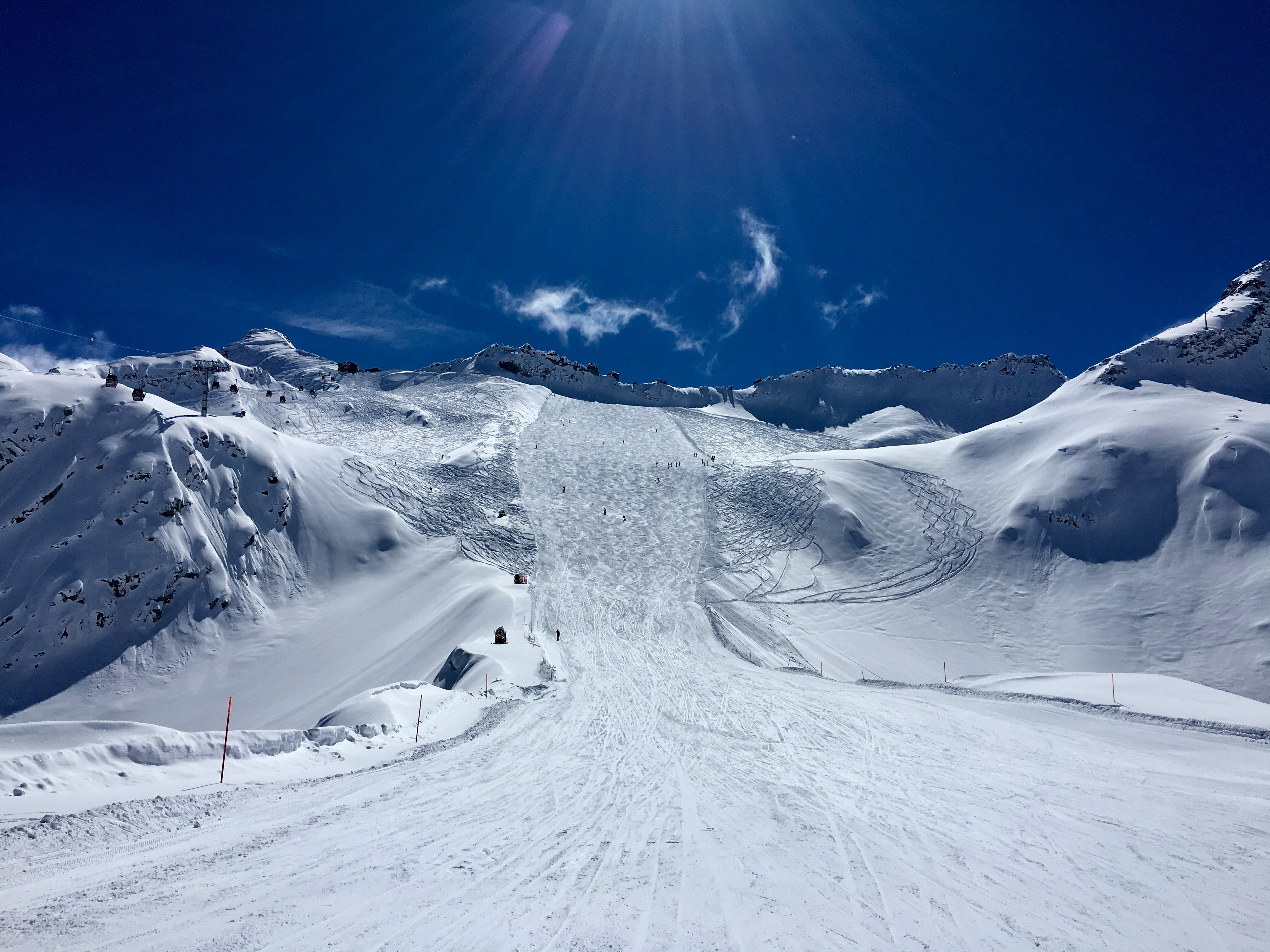 Parco Naturale Adamello (Q47780554)